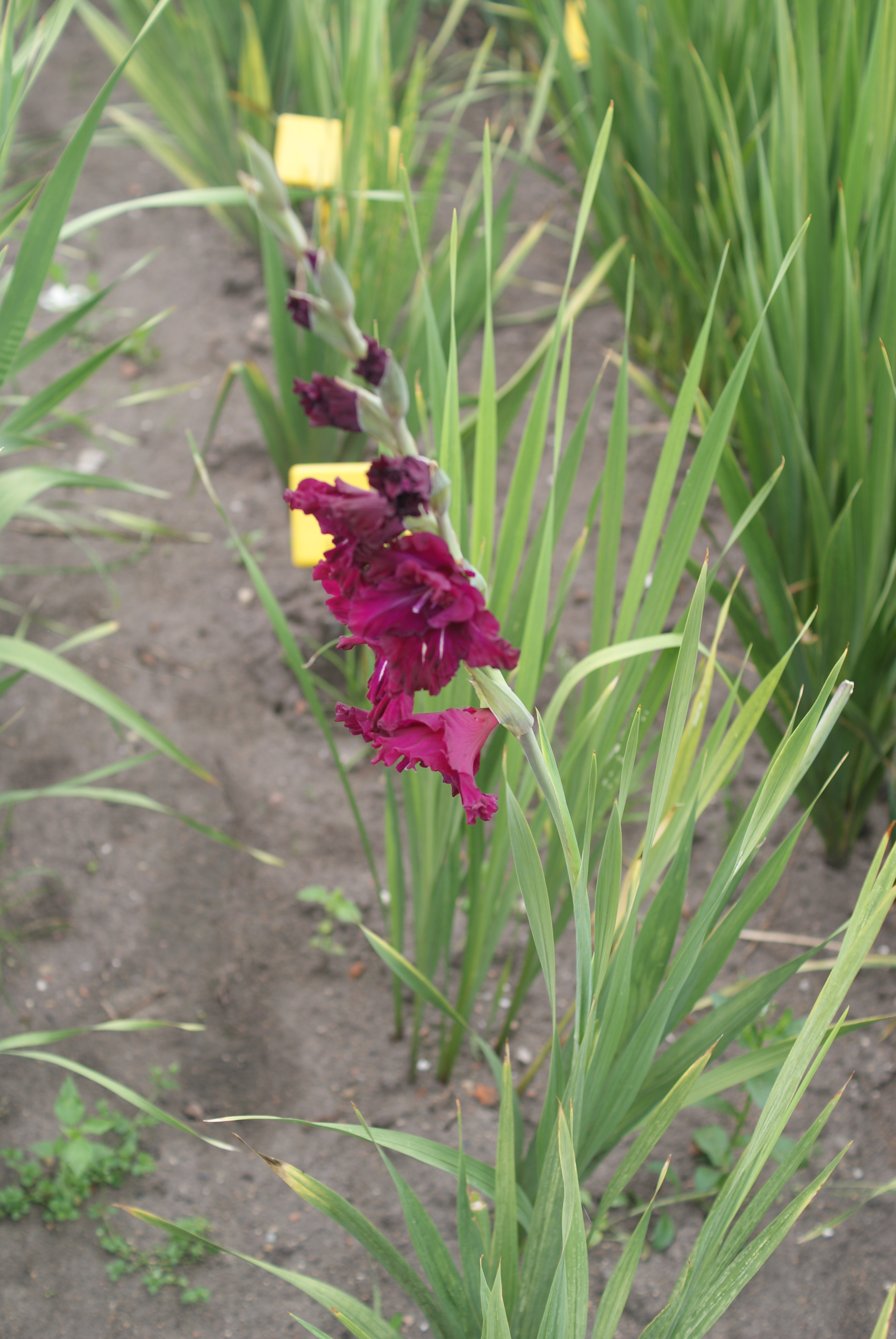 Gladiolus 'Rumburac'